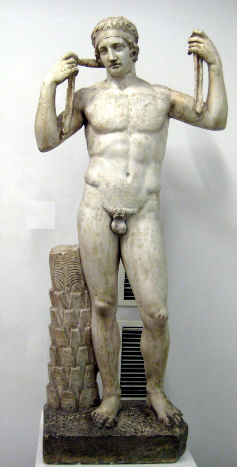 Farnese Diadumenos. Cast